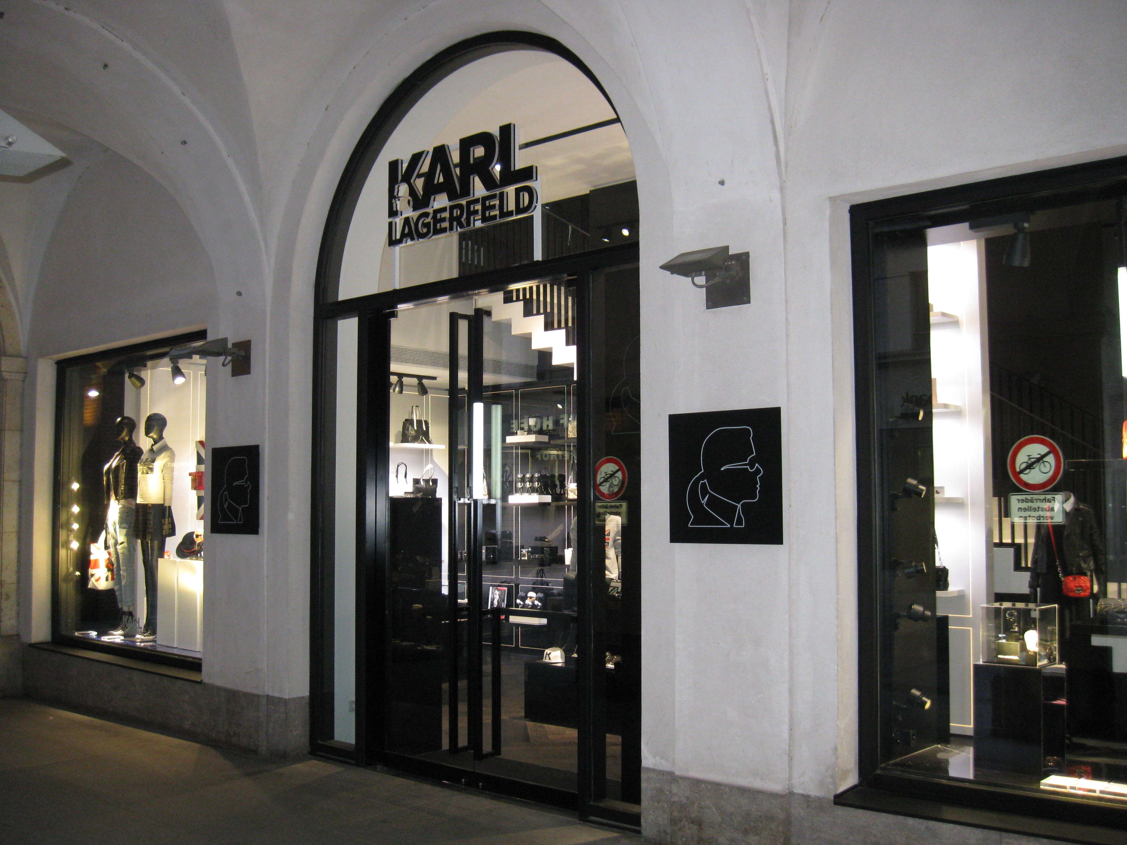 Lagerfeld Shop, München 2014